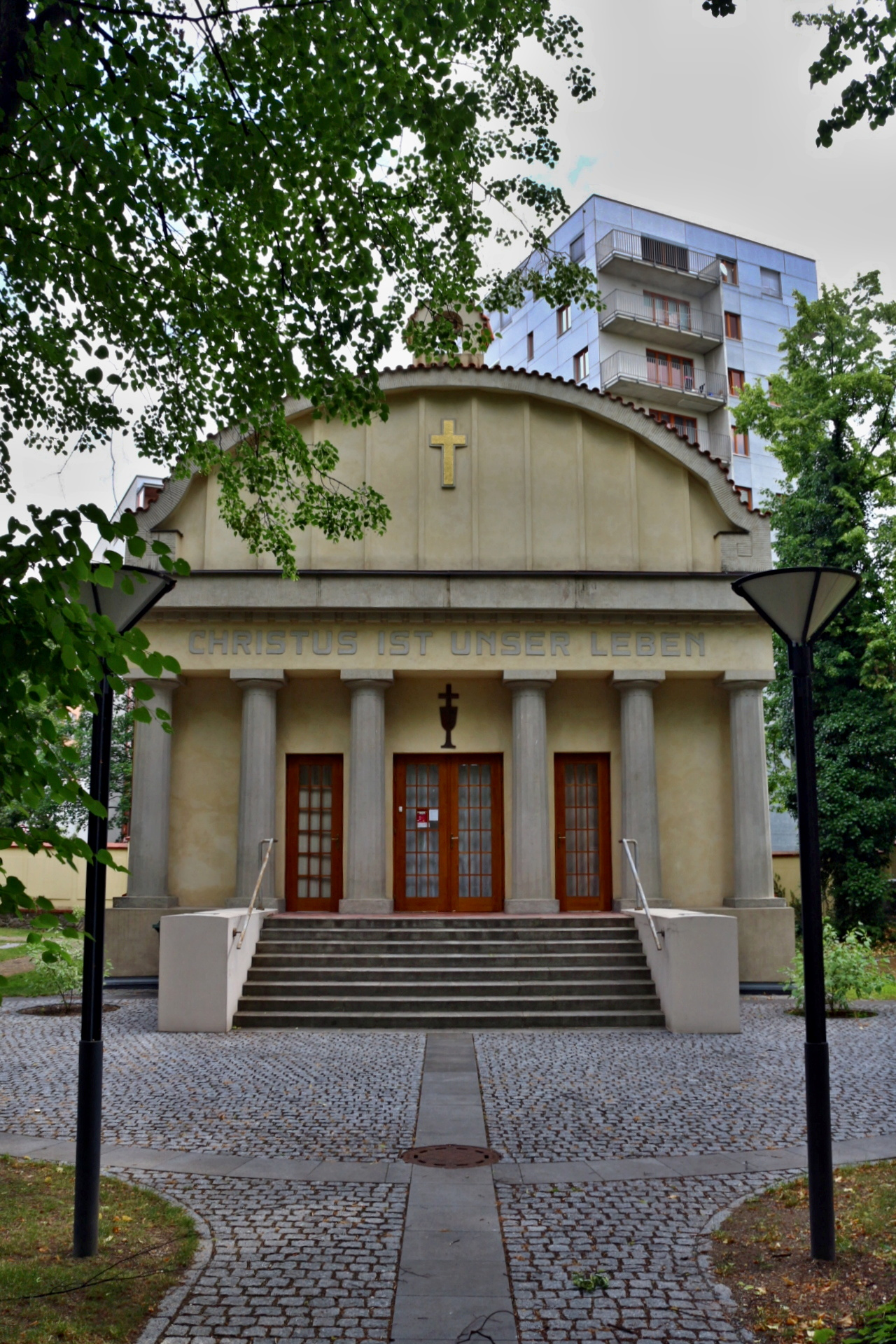 Kaple na německém evangelickém hřbitově ve Strašnicích